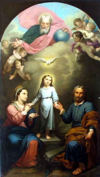 Doppelte Dreifaltigkeit